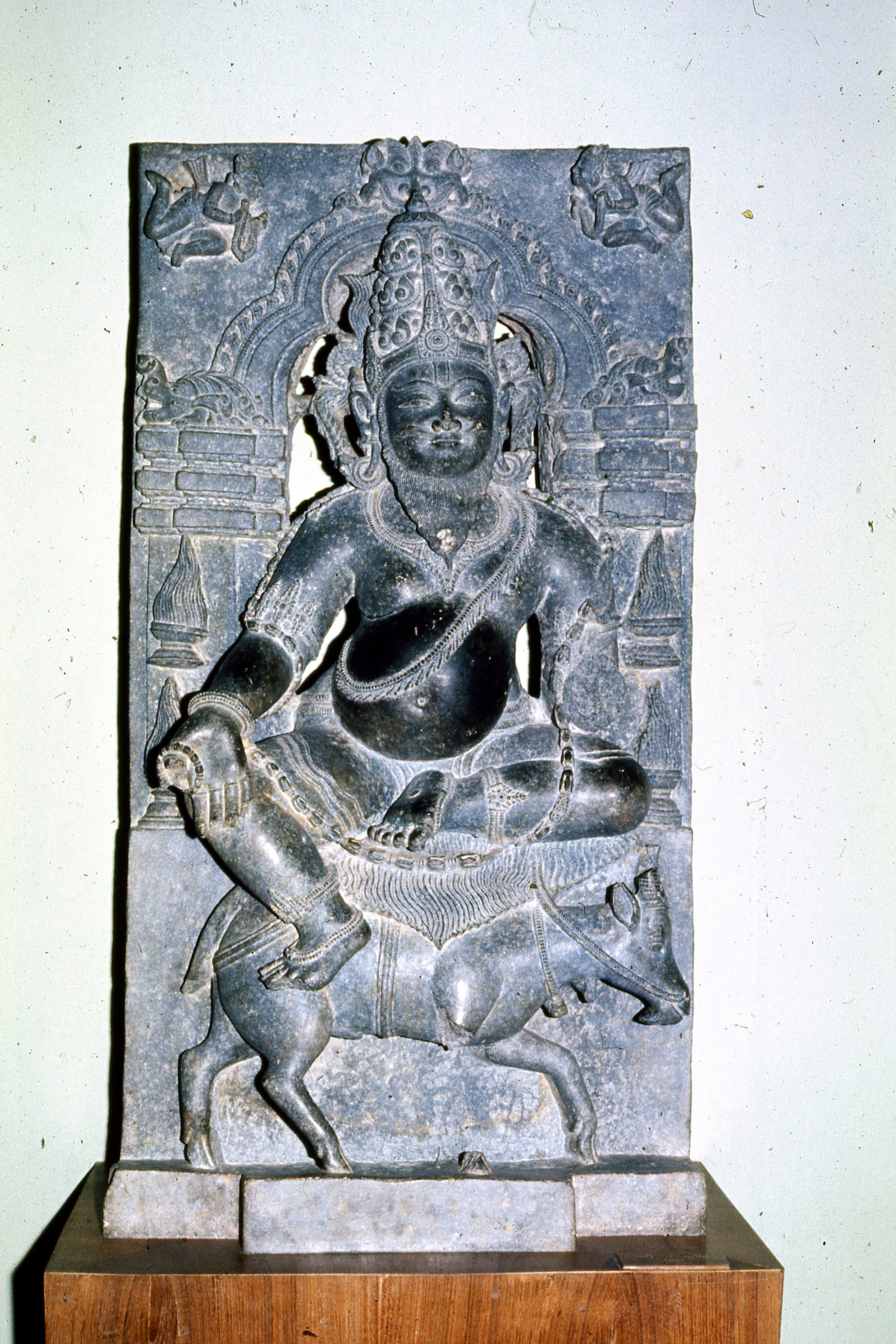 Museo estatal de Orissa, Siglo XIII,Escultura de Agni dios del Fuego en el hinduismo, probablemente provenga del templo del Sol Konarak. Bhuvanesvar, Orissa, India.